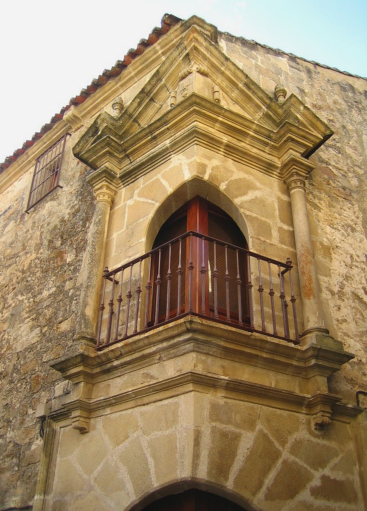 Très caractéristique de certaines constructions de Trujillo